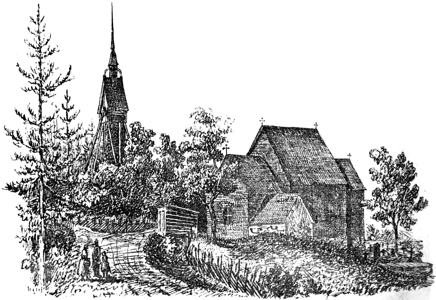 Tidersrums (Tirsrums) kyrka, Östergötland. Teckning i "Utdrag af Antiqvitets-Intendenten P. A. Säves afgifna berättelse för år 1861", publicerad i Antiqvarisk tidskrift för Sverige band 1, 1864.